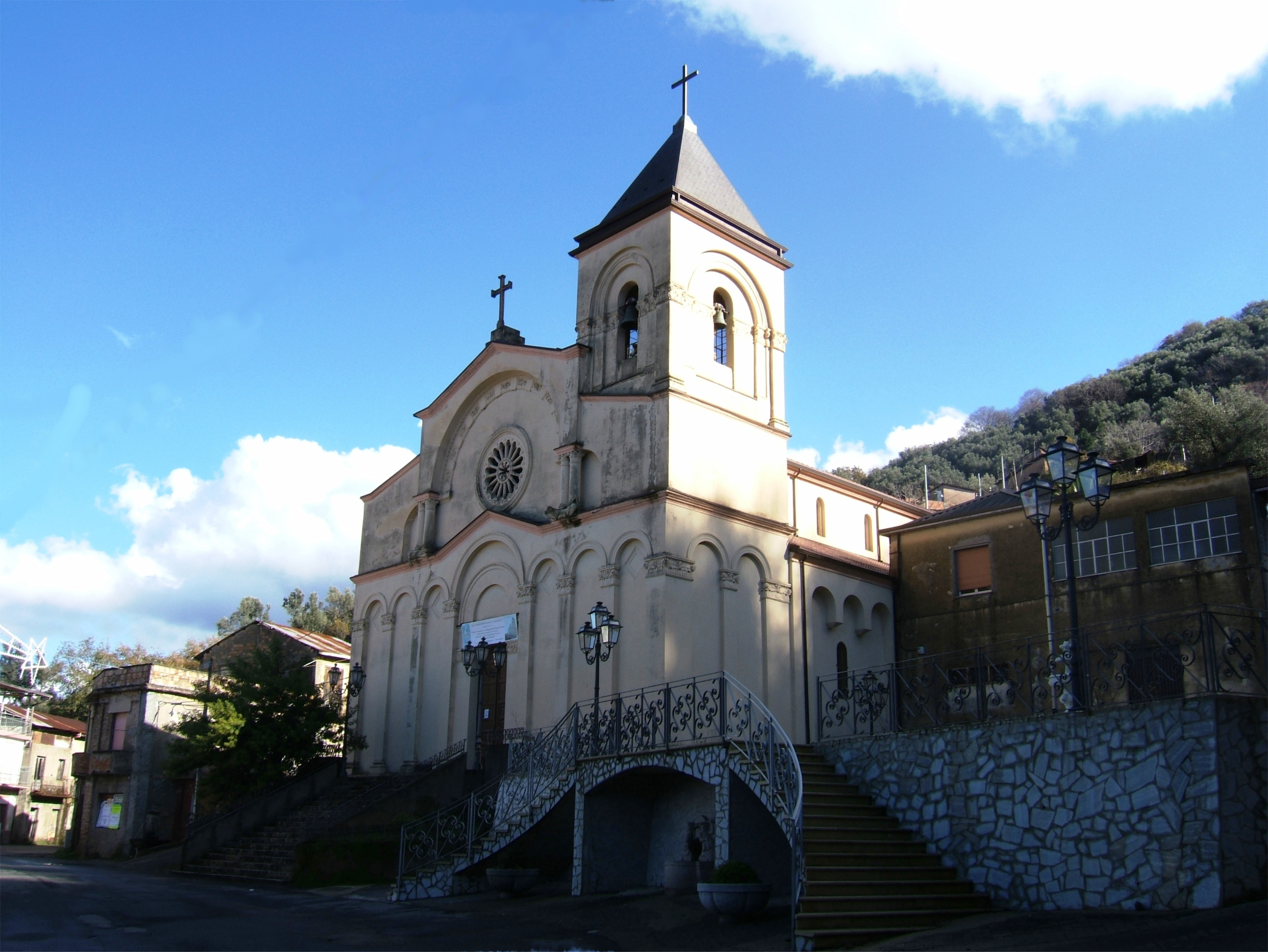 Santuario San Rocco ad Acquato di Cosoleto